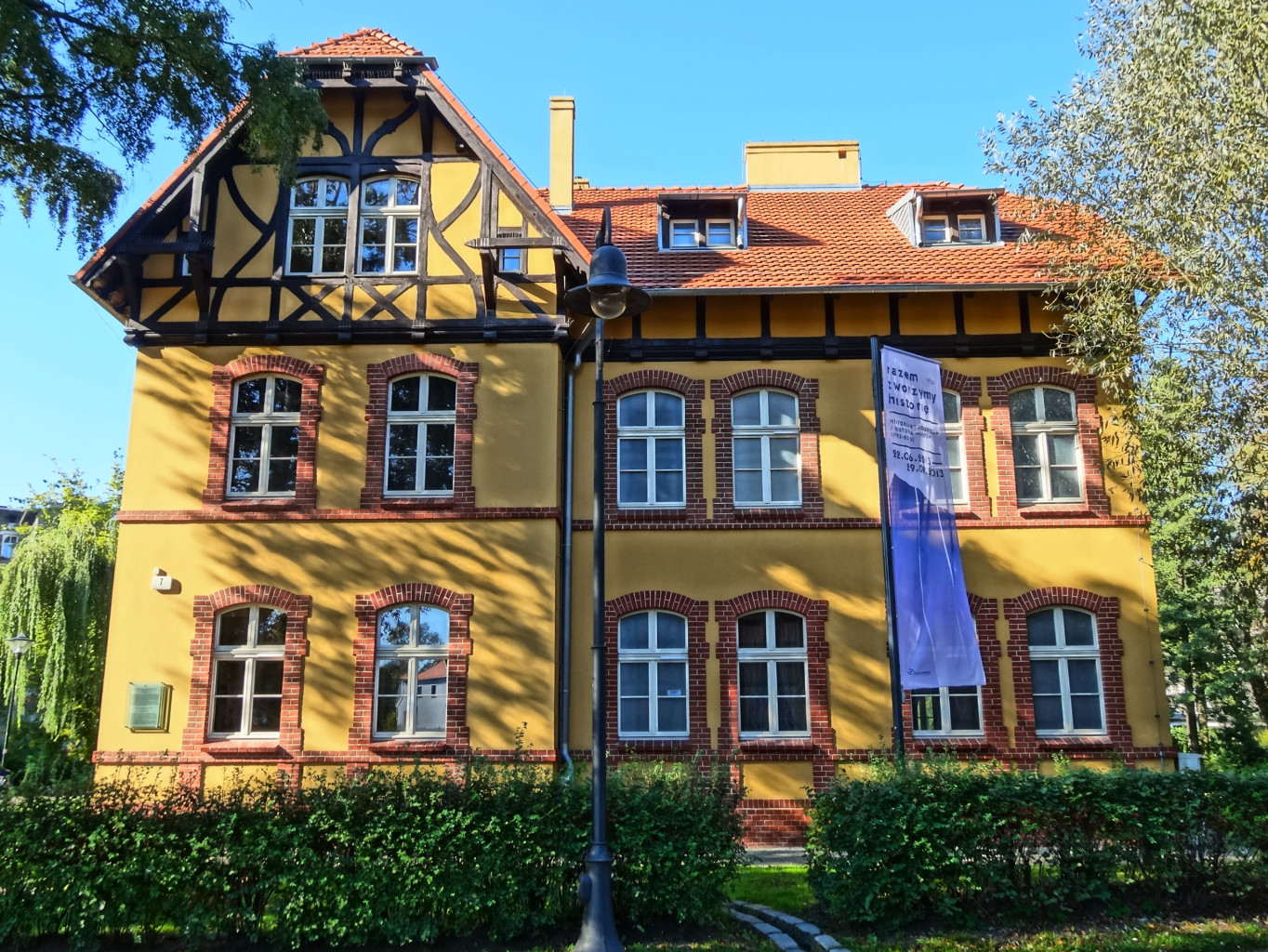 Dom na Wyspie Młyńskiej mieszczący muzeum Leona Wyczółkowskiego (Dom Wyczółkowskiego). Zbud. w 1899 r., od 1979 r. użytkowany przez Muzeum Okręgowe im. L. Wyczółkowskiego